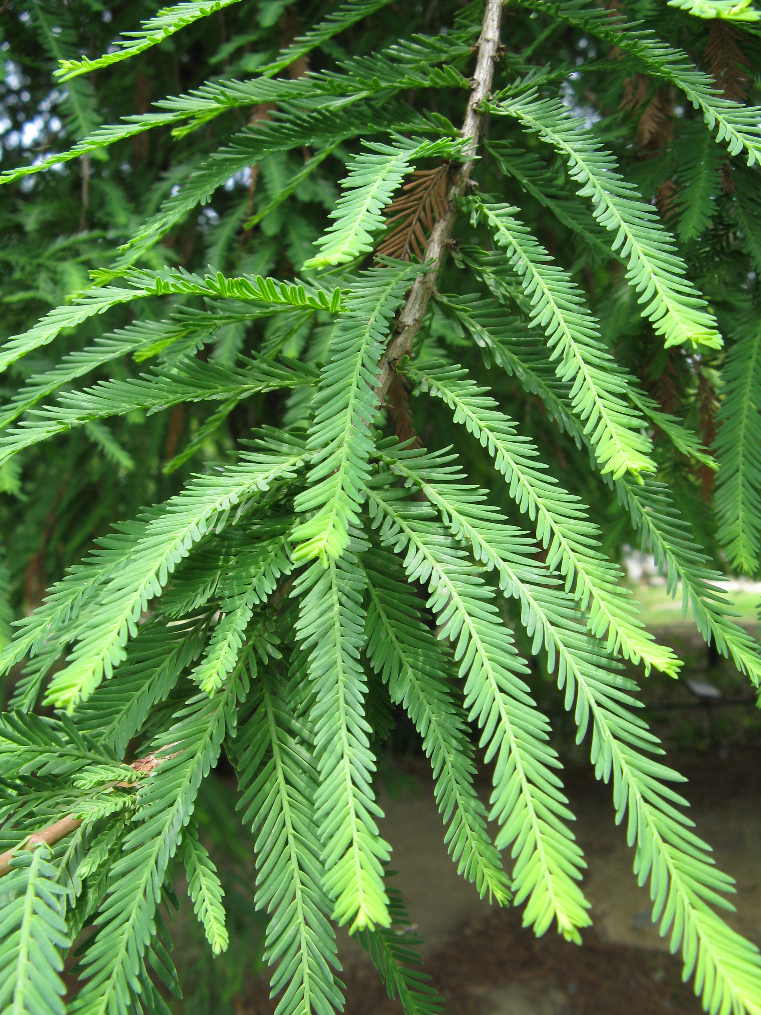 Scientific name Taxodium mucronatum